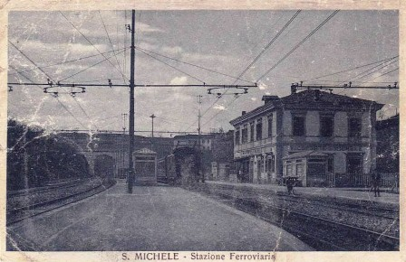 Stazione di Vicoforte-San Michele. Si noti la linea aerea trifase, in opera dal 1934 al 1973.